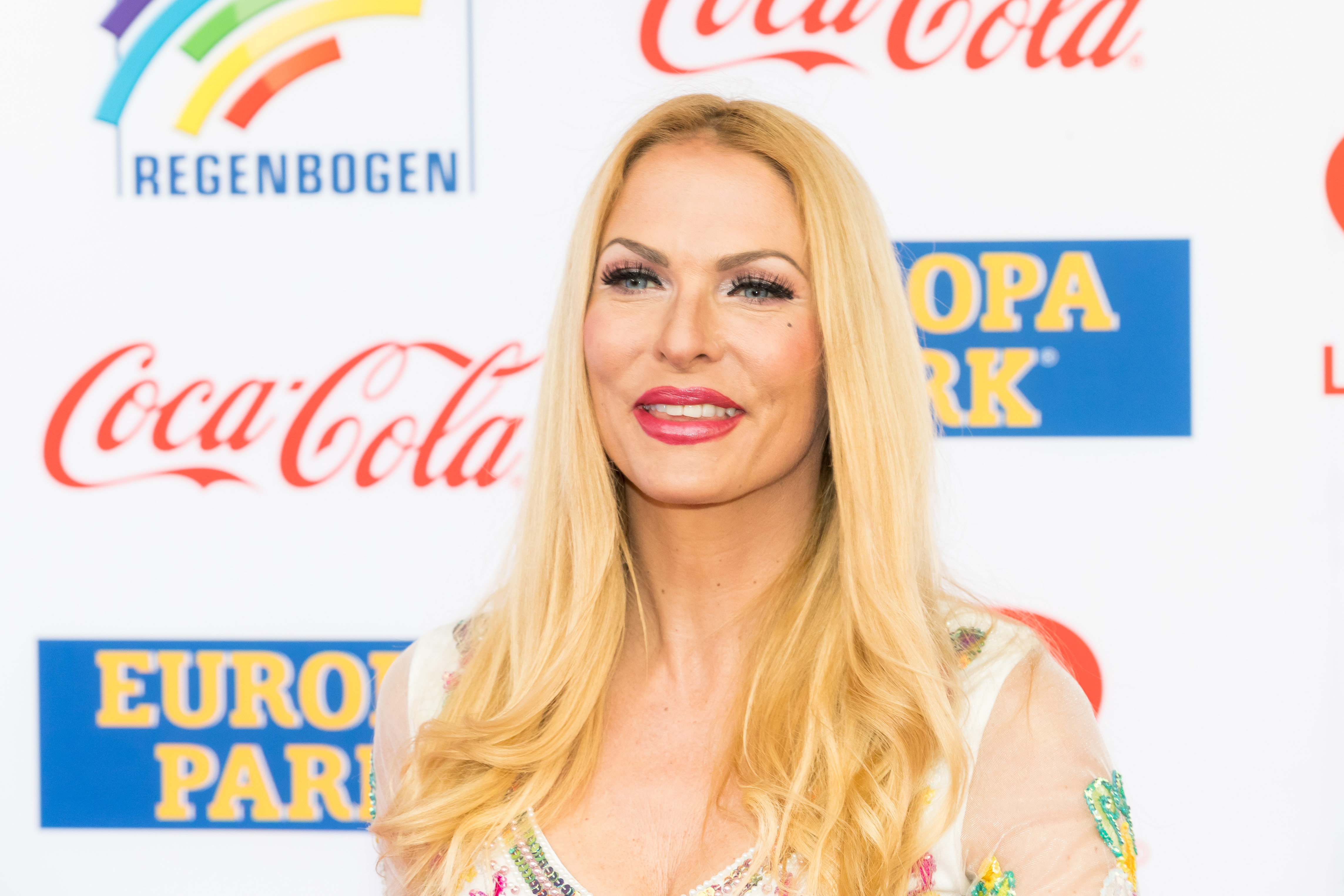 Sonya Kraus during Radio Regenbogen Award 2019 at Europapark, Rust, Baden-Württemberg, Germany on 2019-04-12, Photo: Sven Mandel